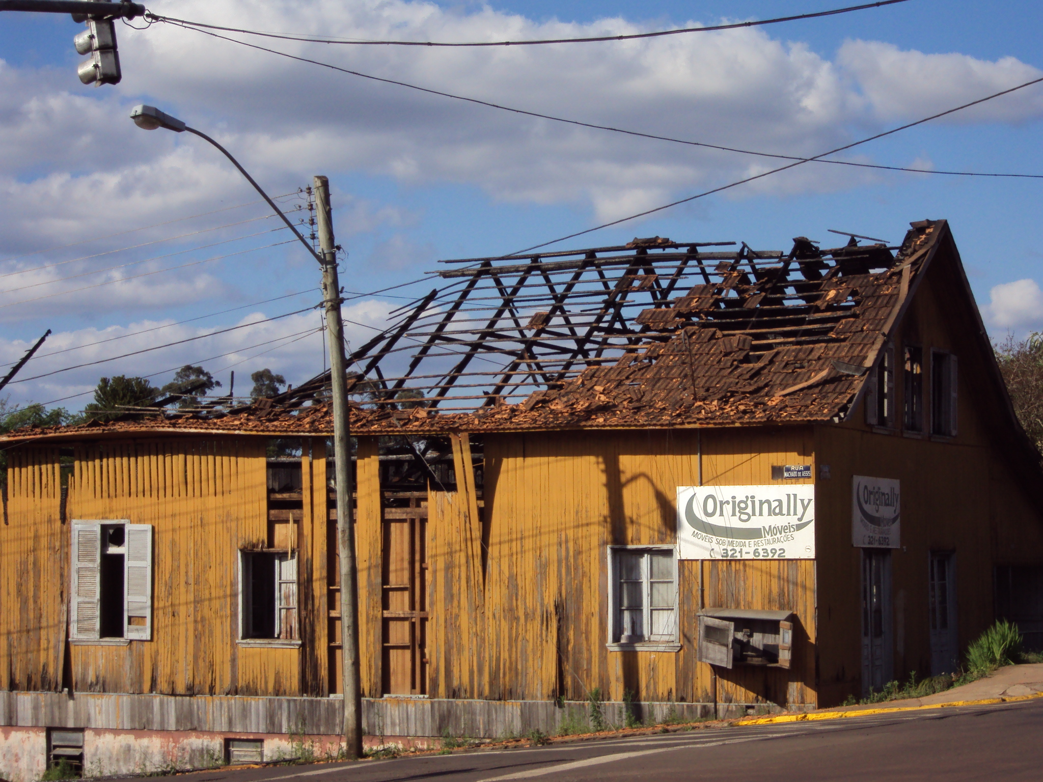 Uma das mais antigas casas localizadas em Erechim, no Brasil, mas foi destruída por fogo.